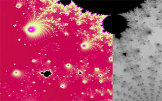 Detaljbild från fraktalen mandelbrotmängden.